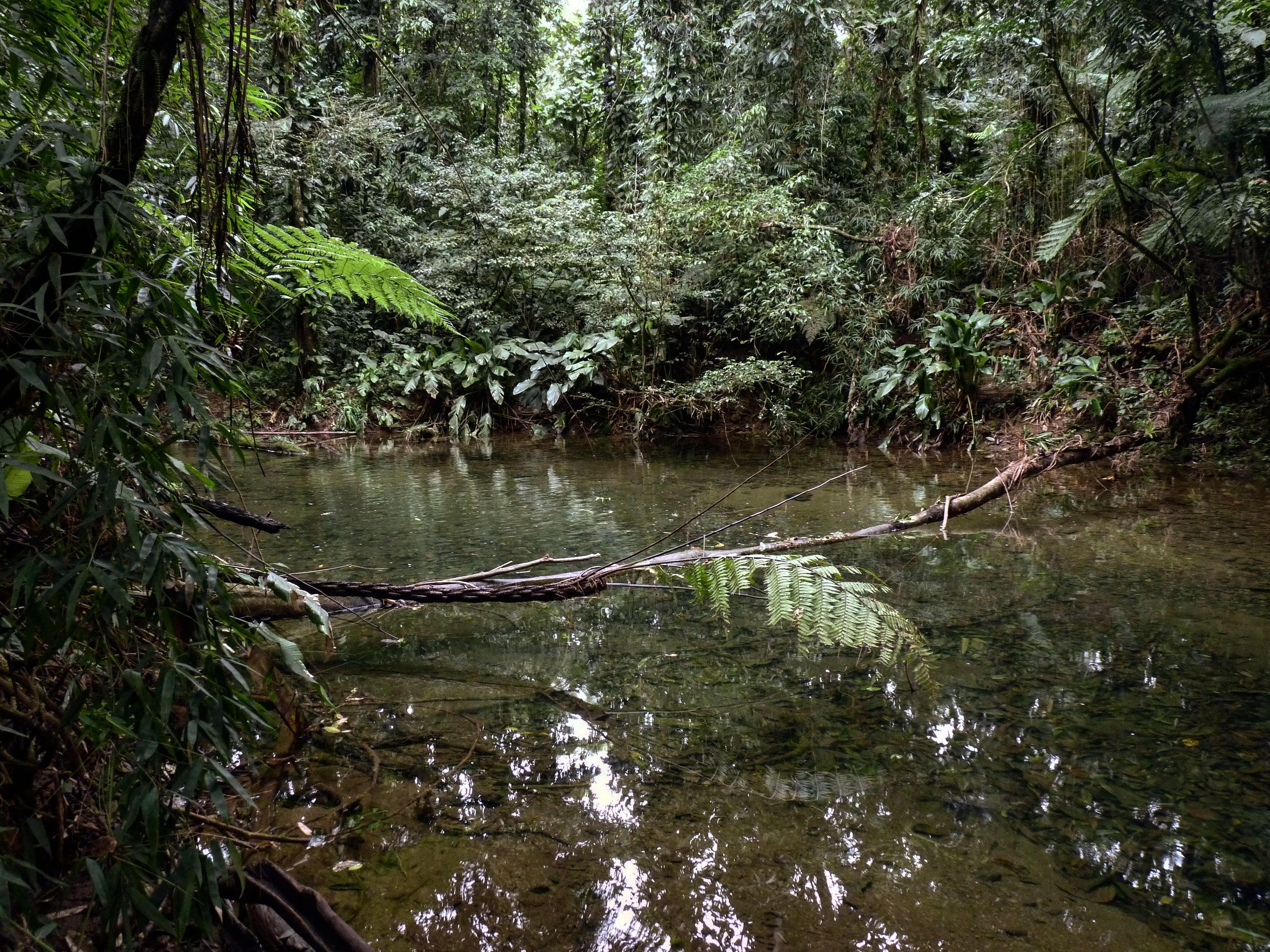 Reserva Particular do Patrimônio Natural Reserva Ecológica Sebuí de nível Federal, localizado (a) em Guaraqueçaba (PR)